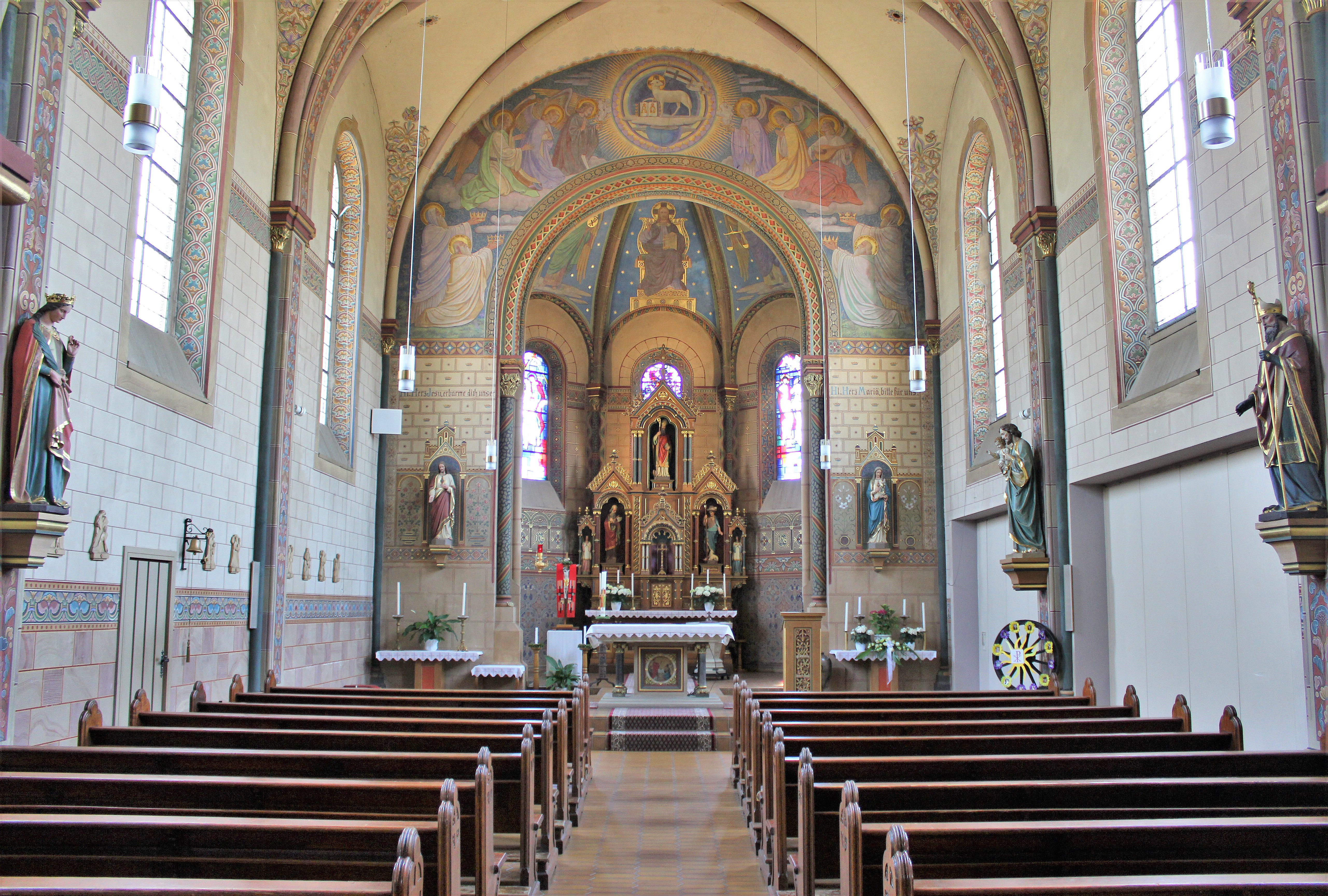 Blick ins Innere der katholischen Kirche St. Medardus in Neuforweiler, einem Stadtteil von Saarlouis, Saarland